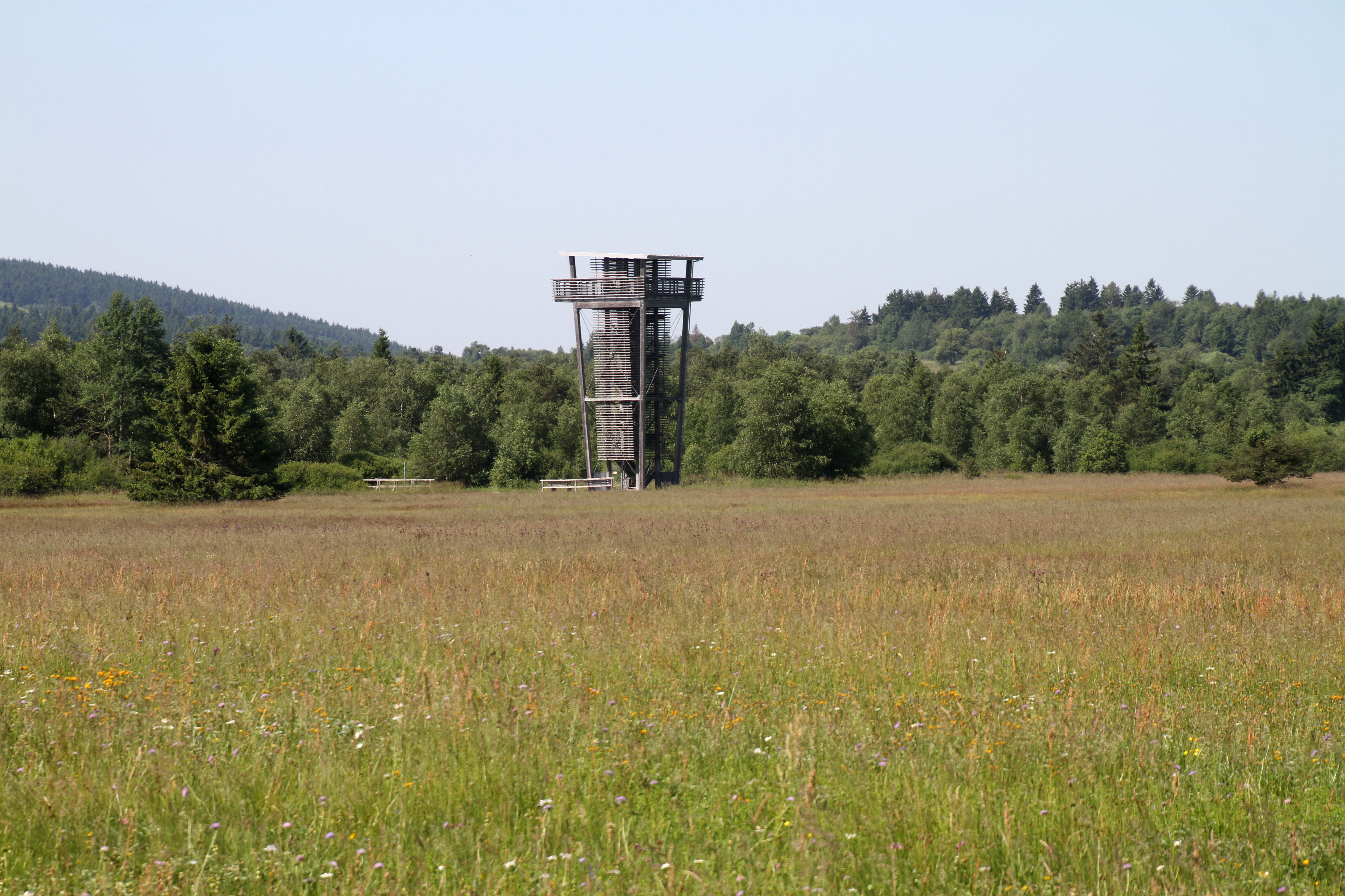 Schwarzes Moor in der Rhön in Hessen